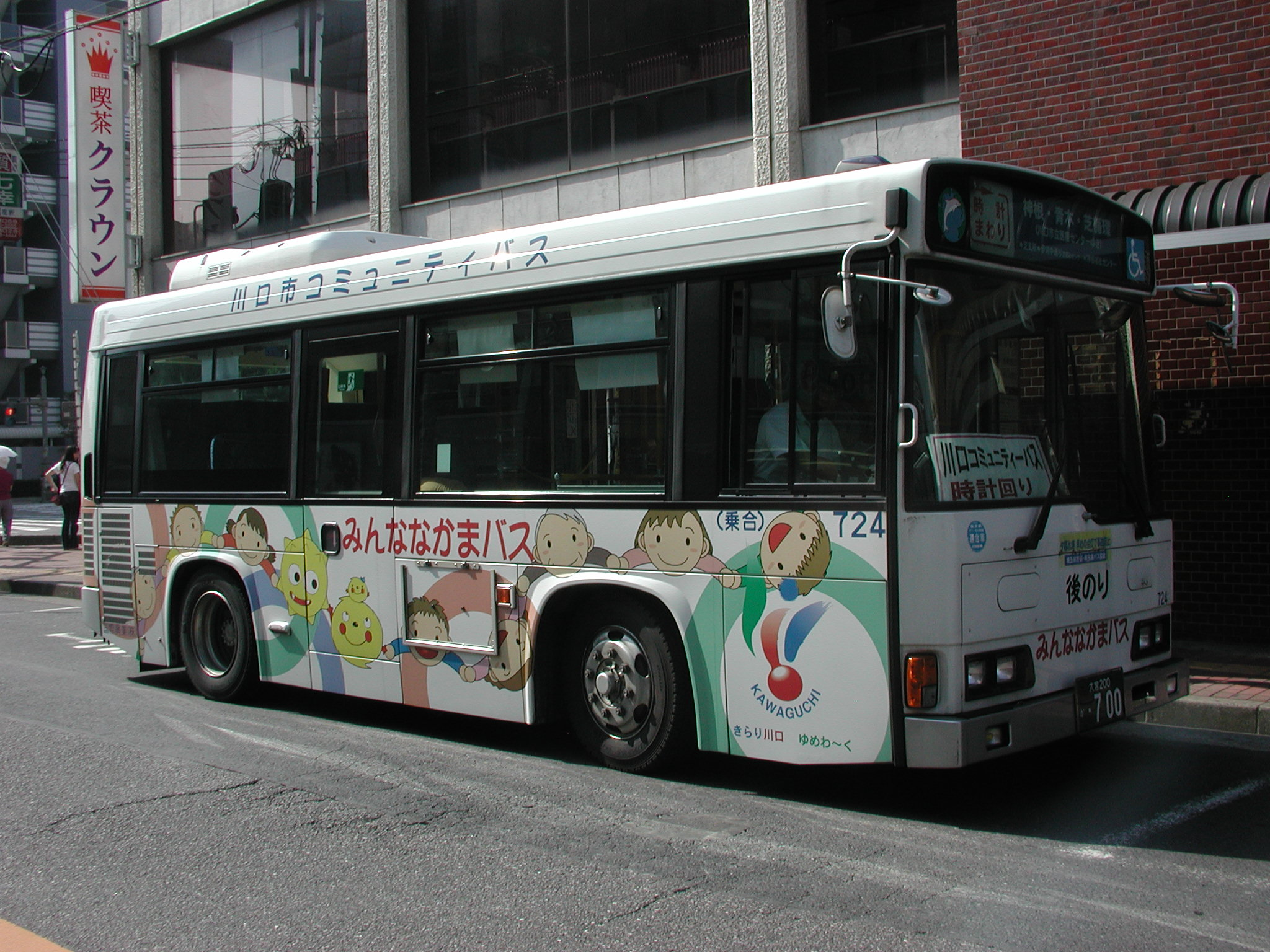 「川口市コミュニティバス『みんななかまバス』」専用車両（日野・レインボーHR：KK-HR1JEEE/国際興業鳩ヶ谷営業所所属：社番・724）：神根・青木・芝循環運用 蕨駅東口にて